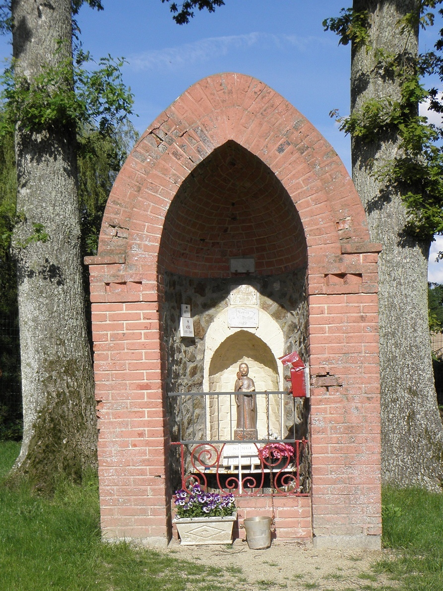 Fontaine Saint-Tudin à Landujan (35).